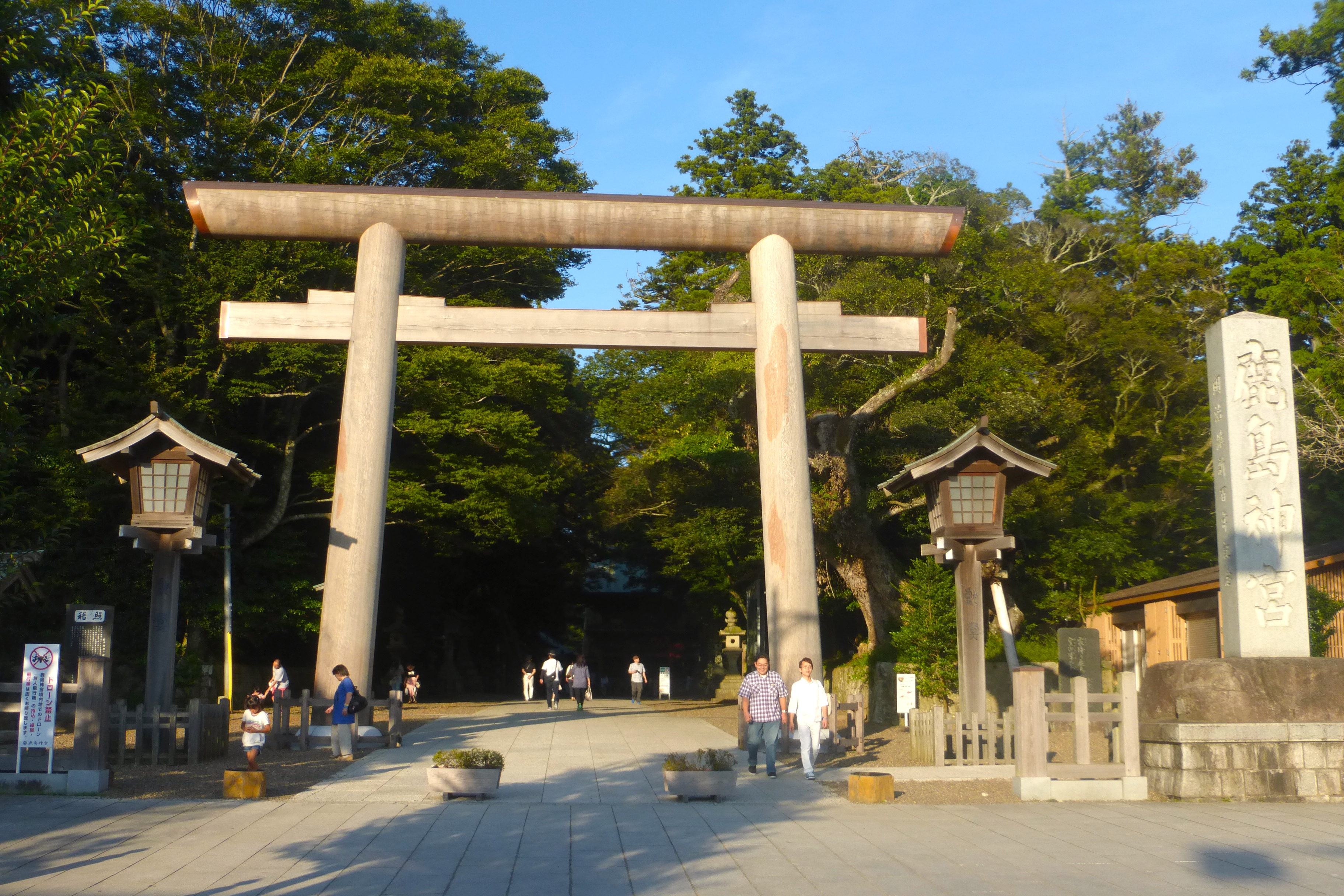 鹿島神宮の新しい鳥居 (Kashima shrine's new torii)